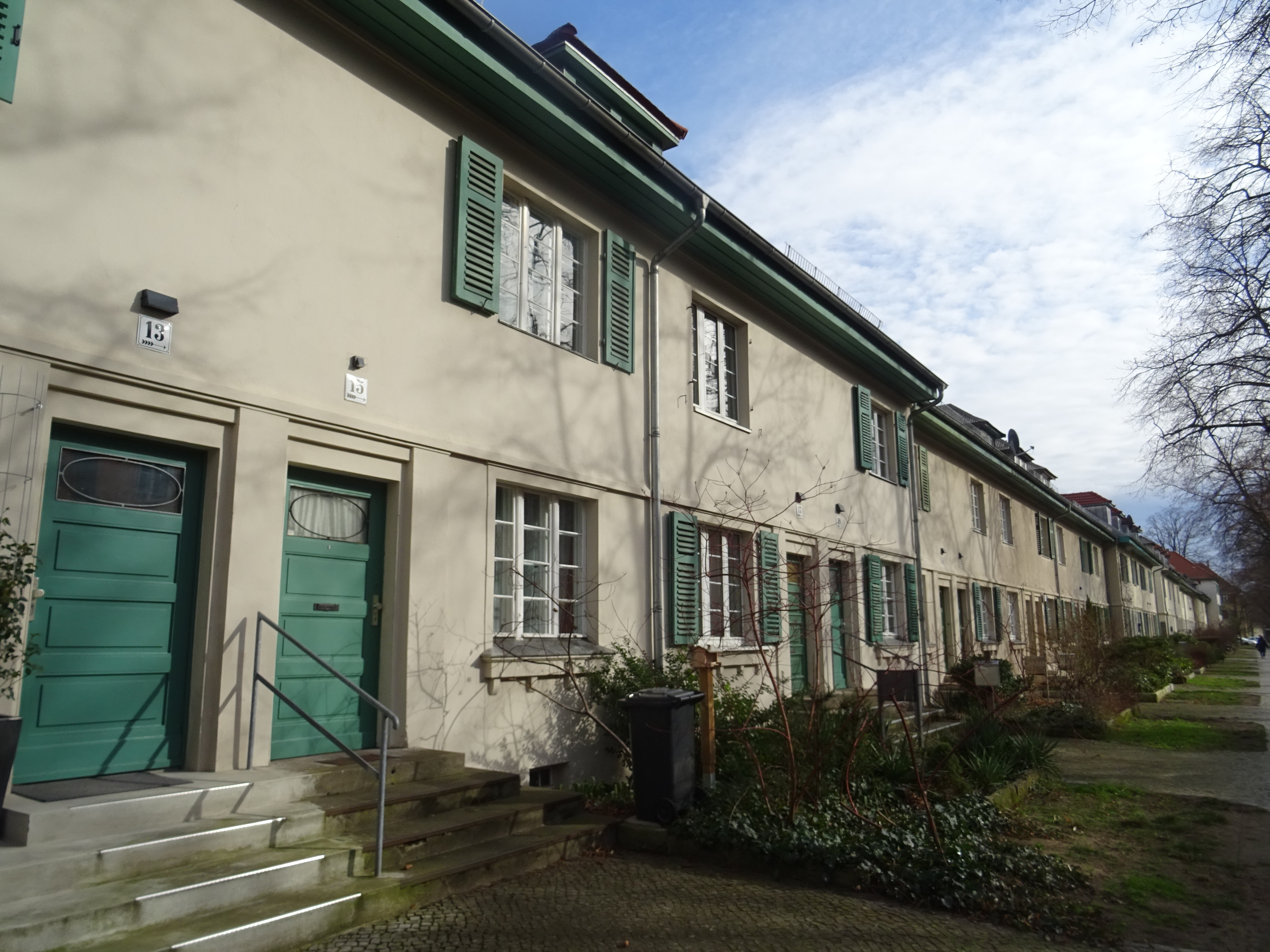 Berlin-Oberschöneweide, Siedlung Oberschöneweide von Peter Behrens u.a.,, Straßenzug in der Zeppelinstr